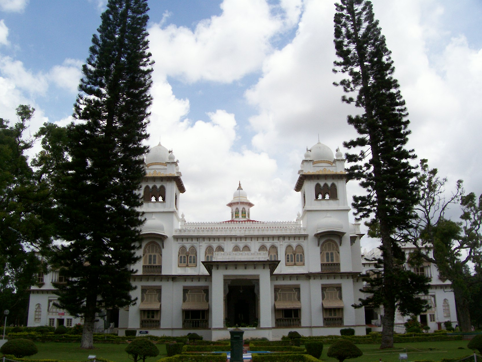 മൈസൂരിലുള്ള പോസ്റ്റൽ ട്രെയ്നിങ് സെന്റർ